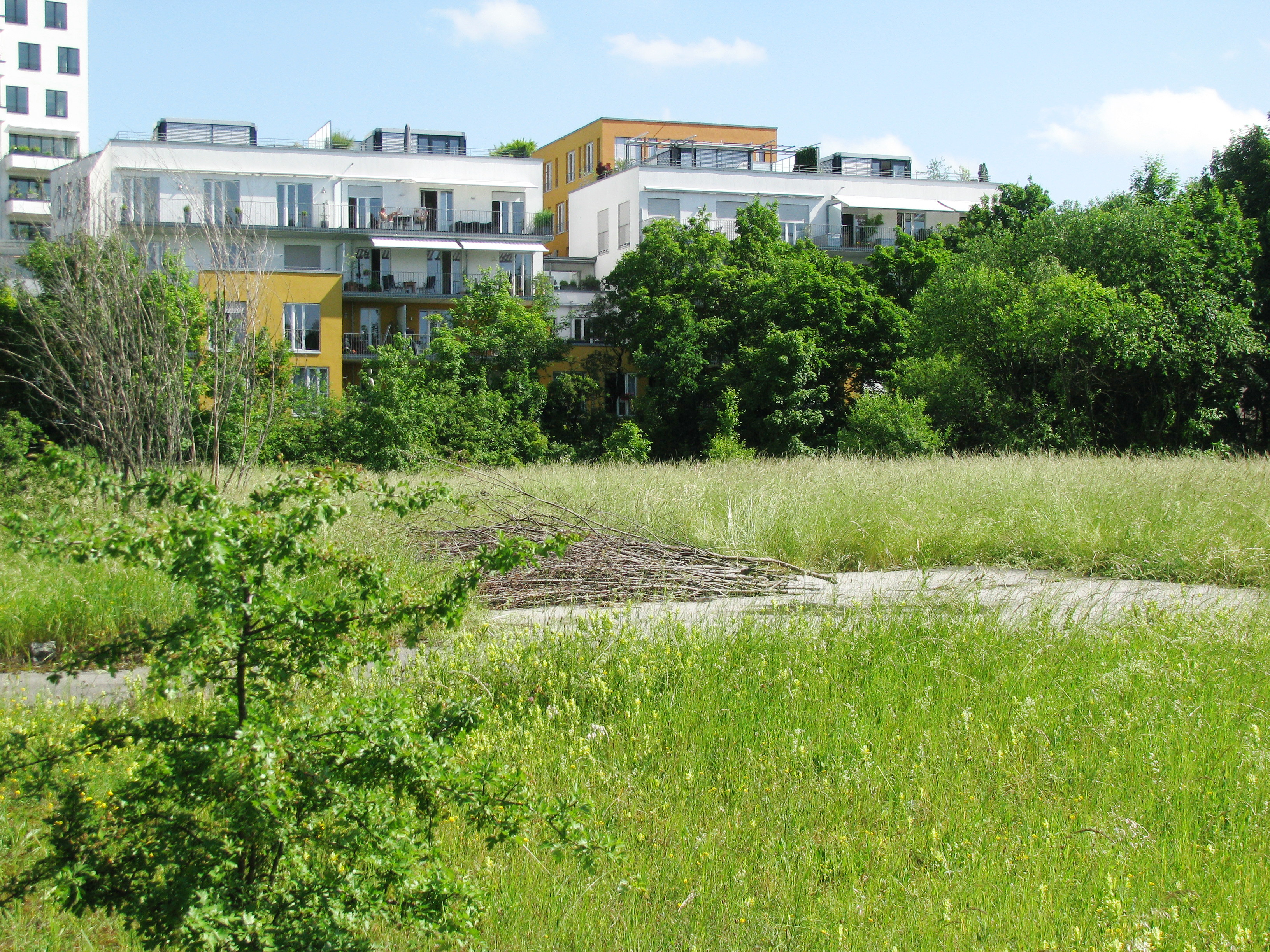 Biotop am Ackermannbogen im Sommer